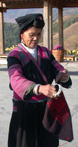 红瑶妇女。Vincivinci摄于广西龙胜